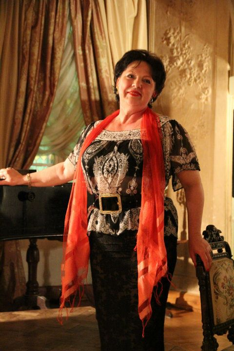 Koncert z cyklu "Operetka moja miłość" - 6 czerwca 2011 - Klub Dziennikarzy "Pod Gruszką" - Kraków